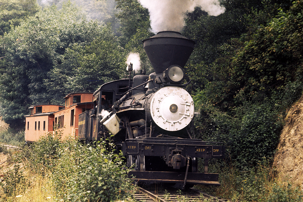 KHV 10 Aug 1972 Pickering 10xRP.